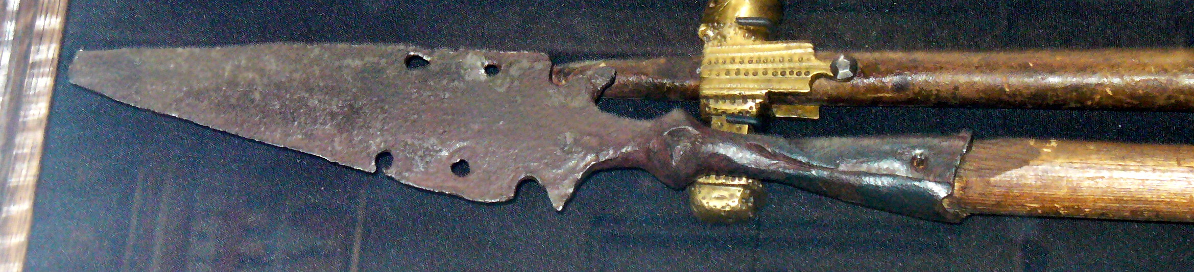 Рогатина. Россия, XVII век. Дерево, железо.